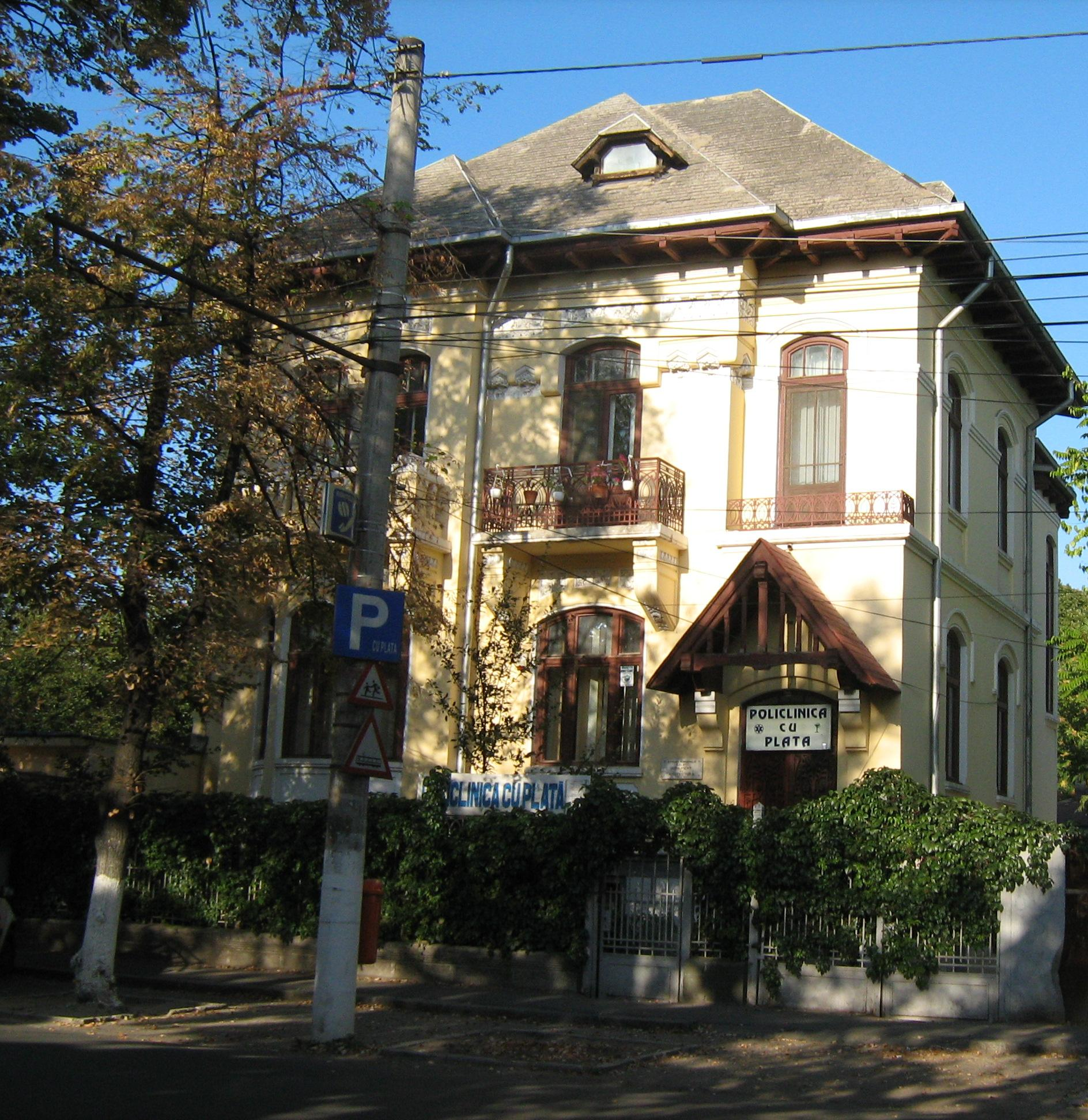 Galati - Casa azi Policlinica